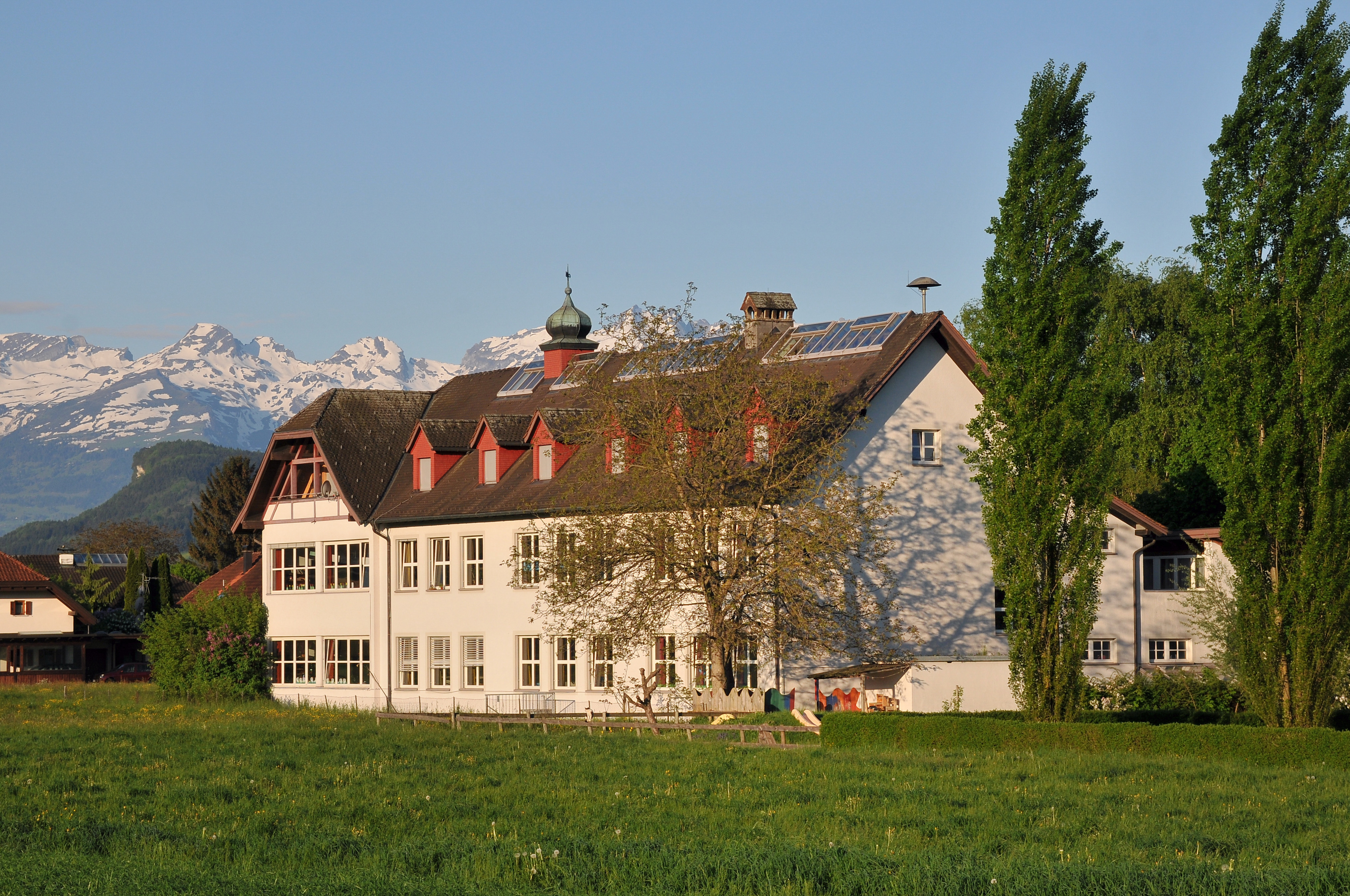 Volksschule in Rankweil-Brederis an der Kirchstraße 14.